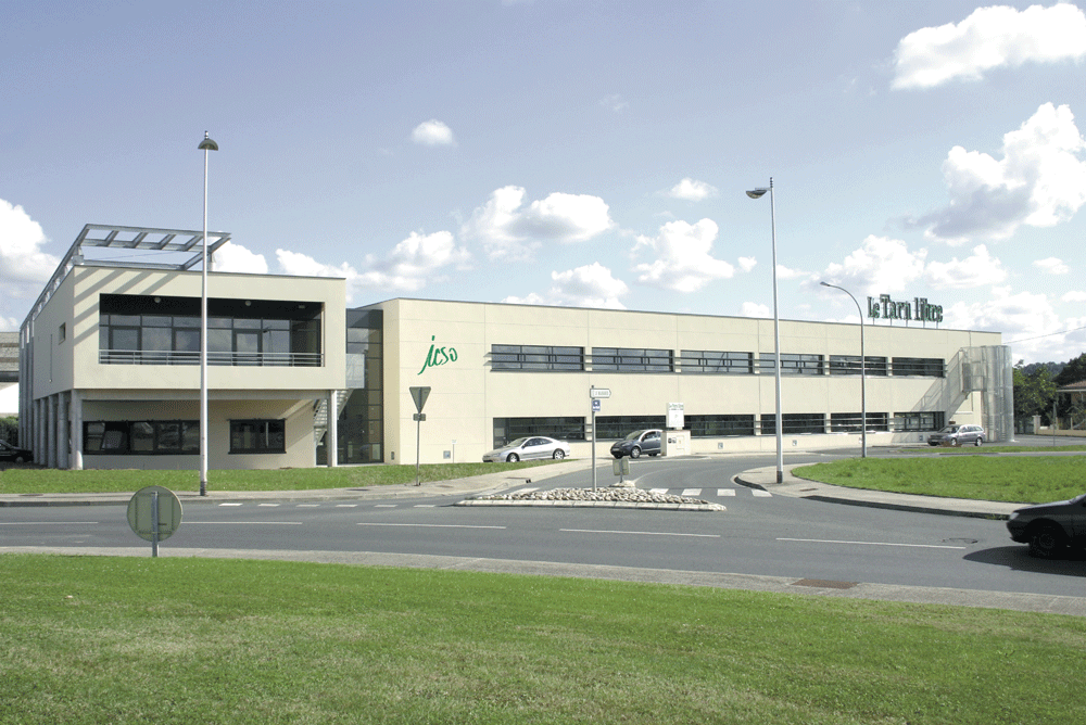 Cette photo est la façade du bâtiment hébergeant les locaux du Tarn Libre et de l'Imprimerie Coopérative du Sud Ouest